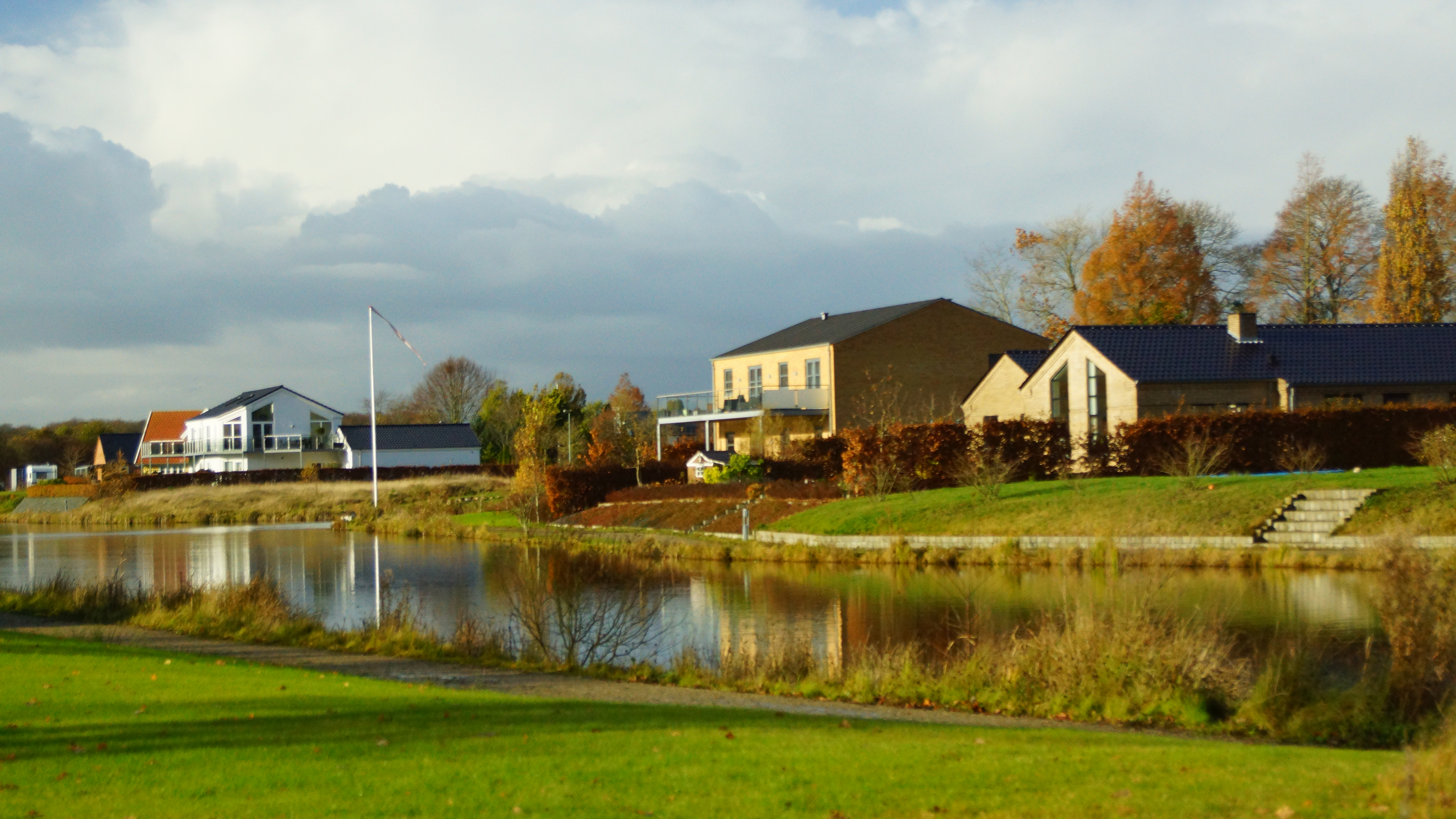 10'er byggeri Ryomgård